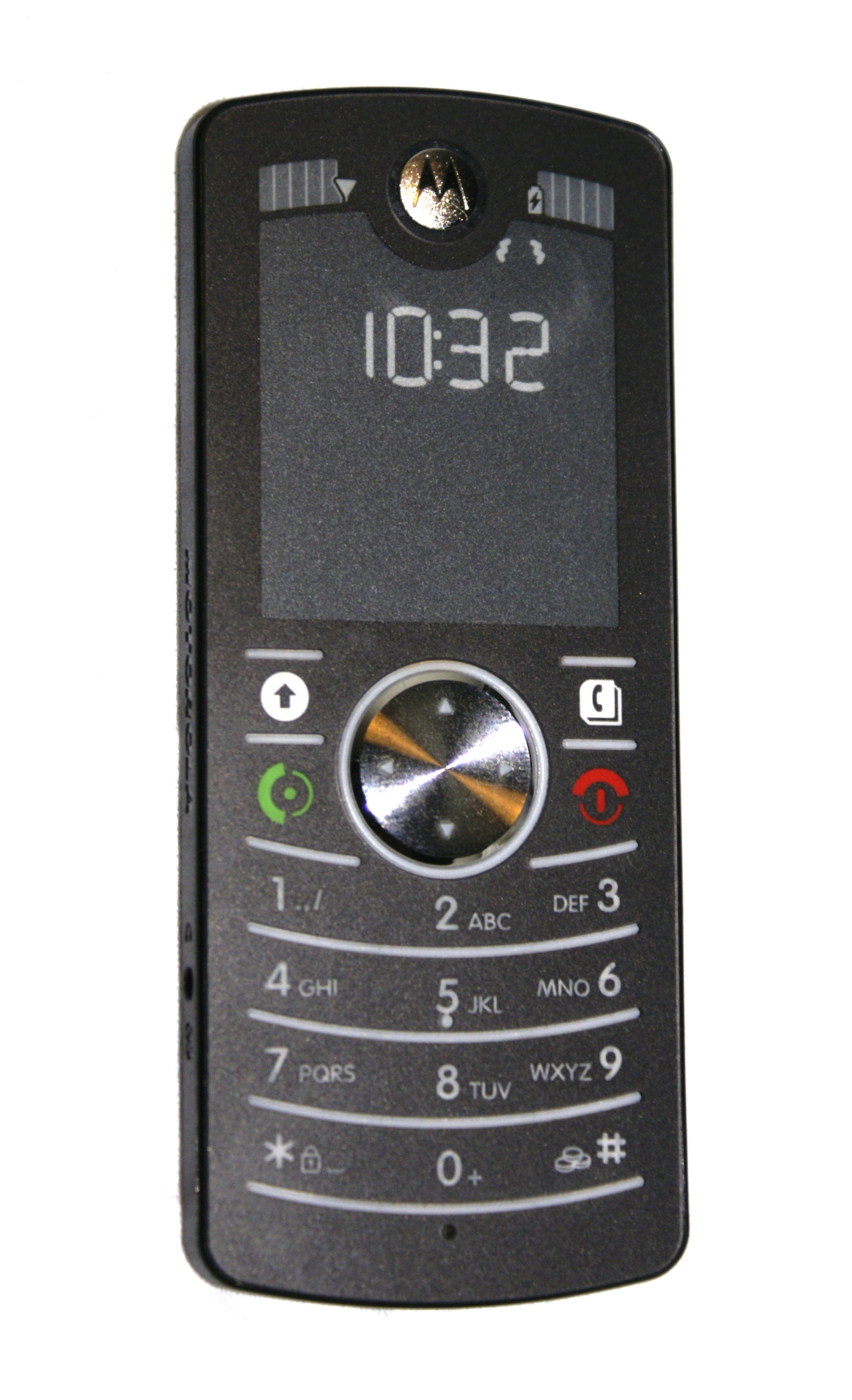 MOTOFONE